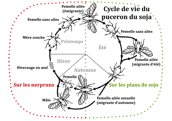 Cycle de vie du puceron du soja. Traduction de l'originale, en anglais.